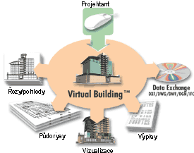 virtualni budova